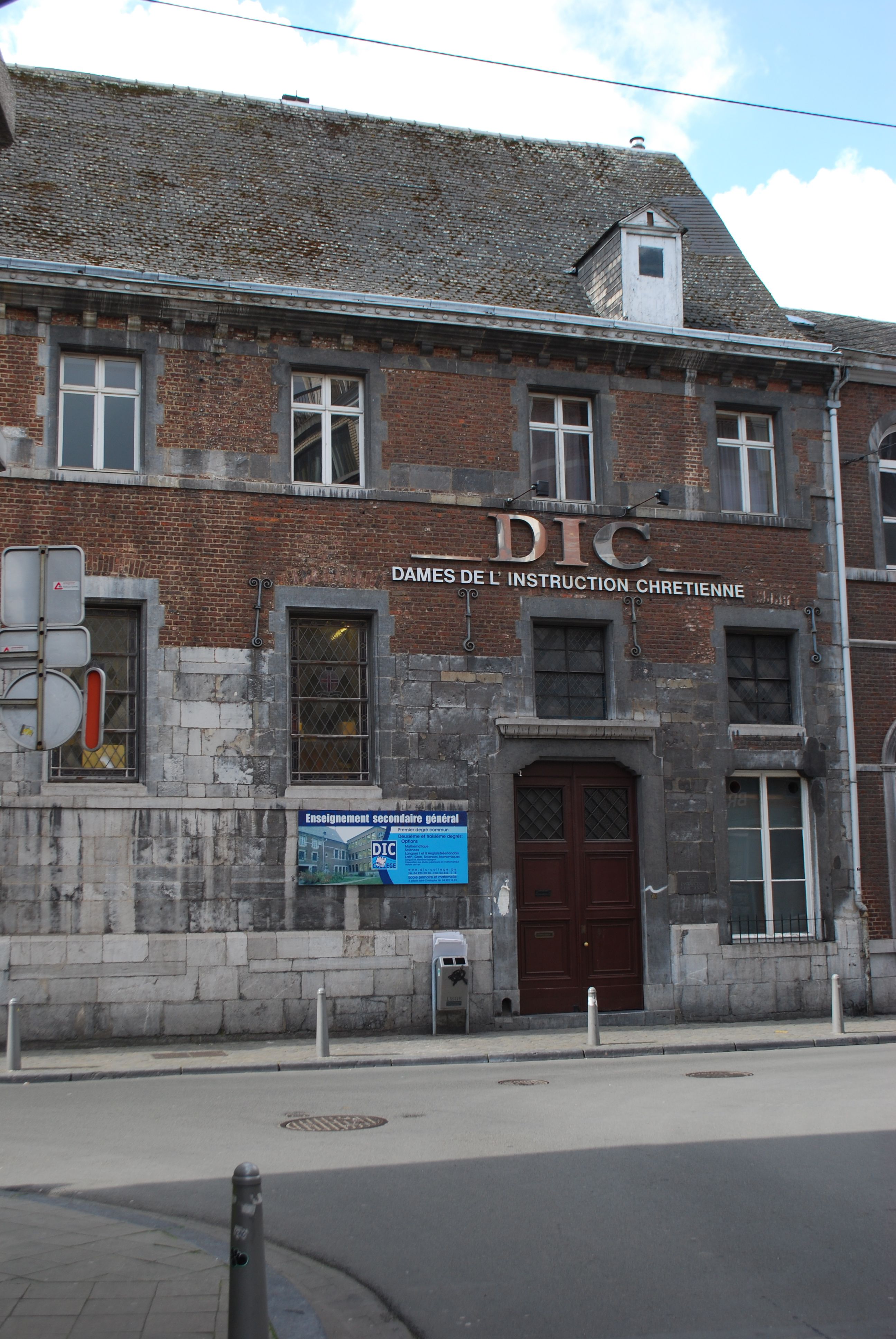 Vue du Collège des Dames de l'Instruction Chrétienne (DIC Collège) à Liège.